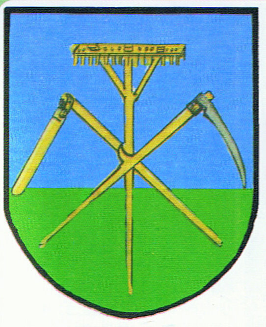 Herb wsi Dobiercice w gminie Byczyna, powiat Kluczborski, województwo opolskie